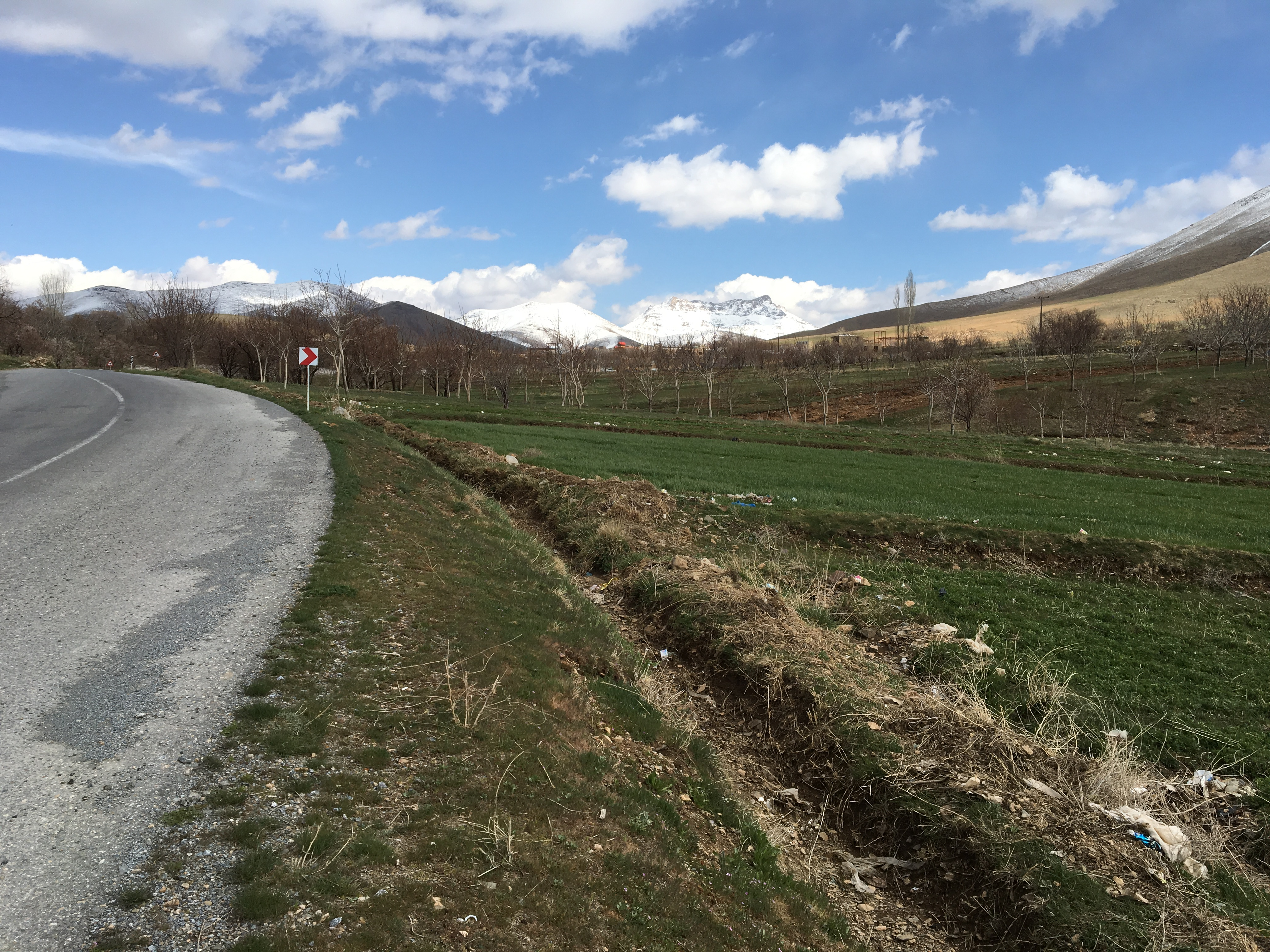 ورودی روستا در فصل بهار